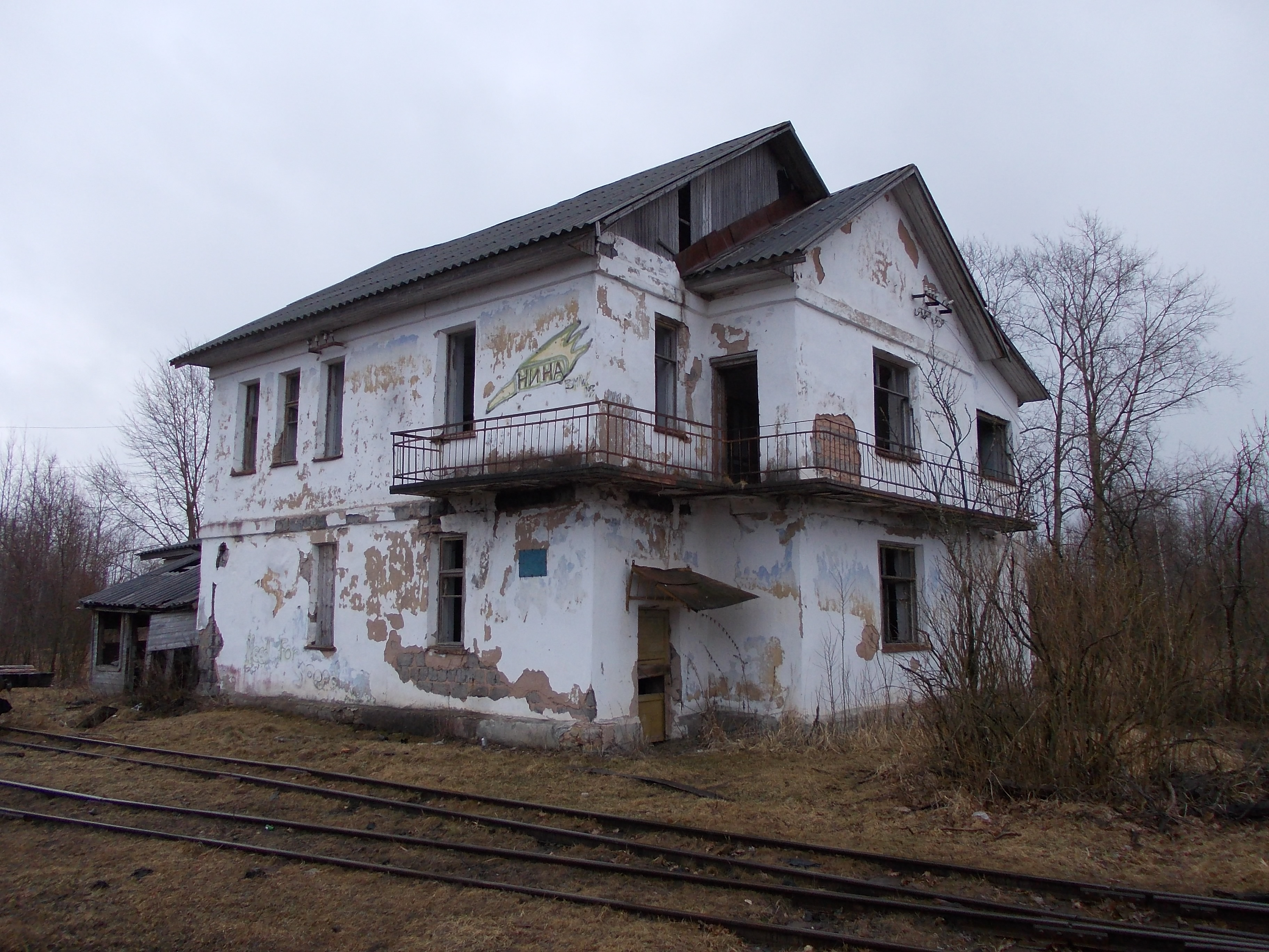 Диспетчерская Тёсовской УЖД, апрель 2015 года.